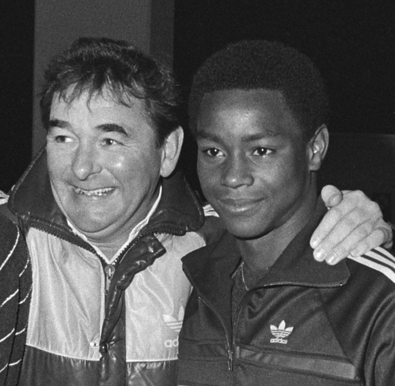 Aankomst van Nottingham Forest op Schiphol; v.l.n.r. manager Brian Clough en speler Chris Fairclough.